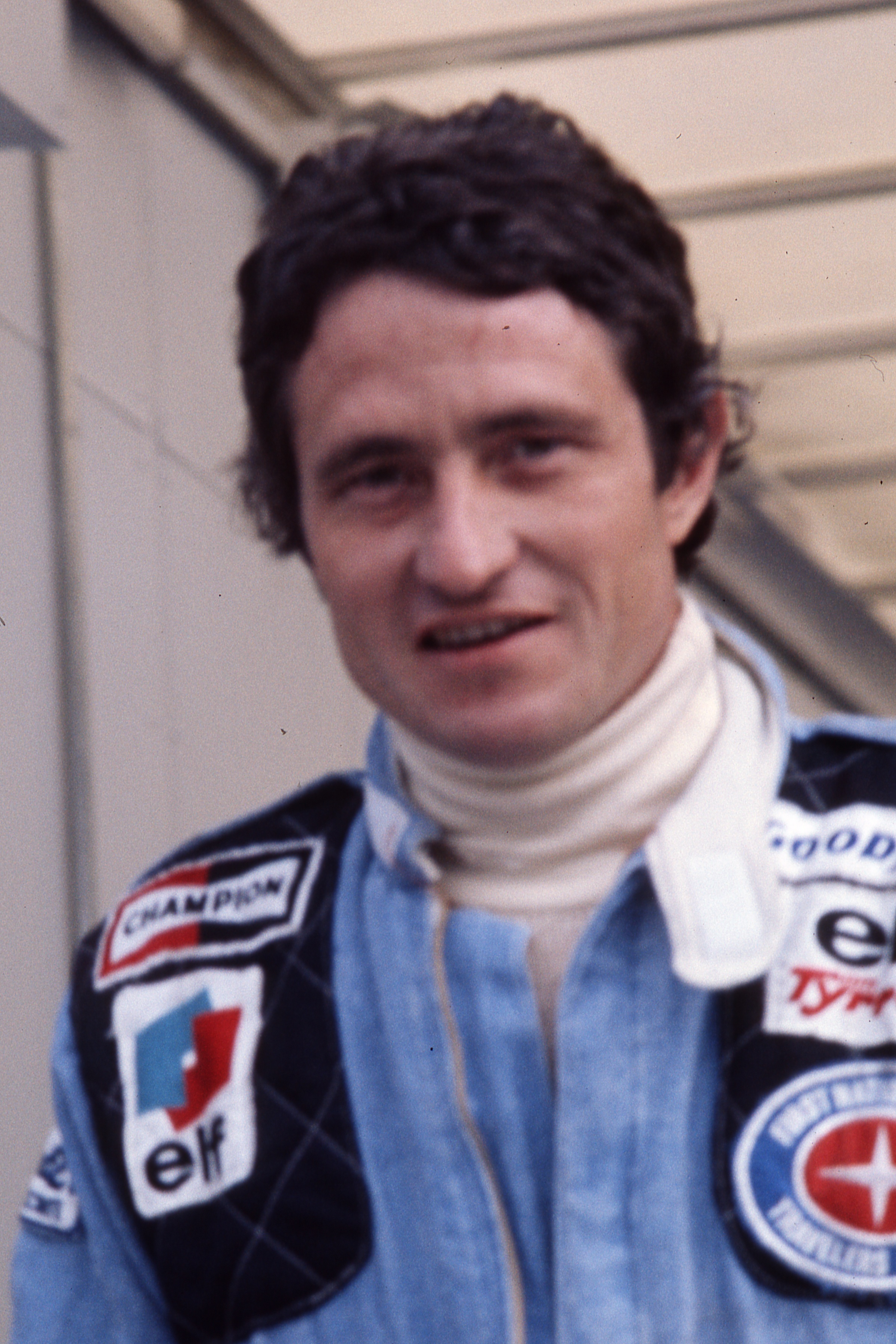 Grand Prix de Silverstone, GB, 1977